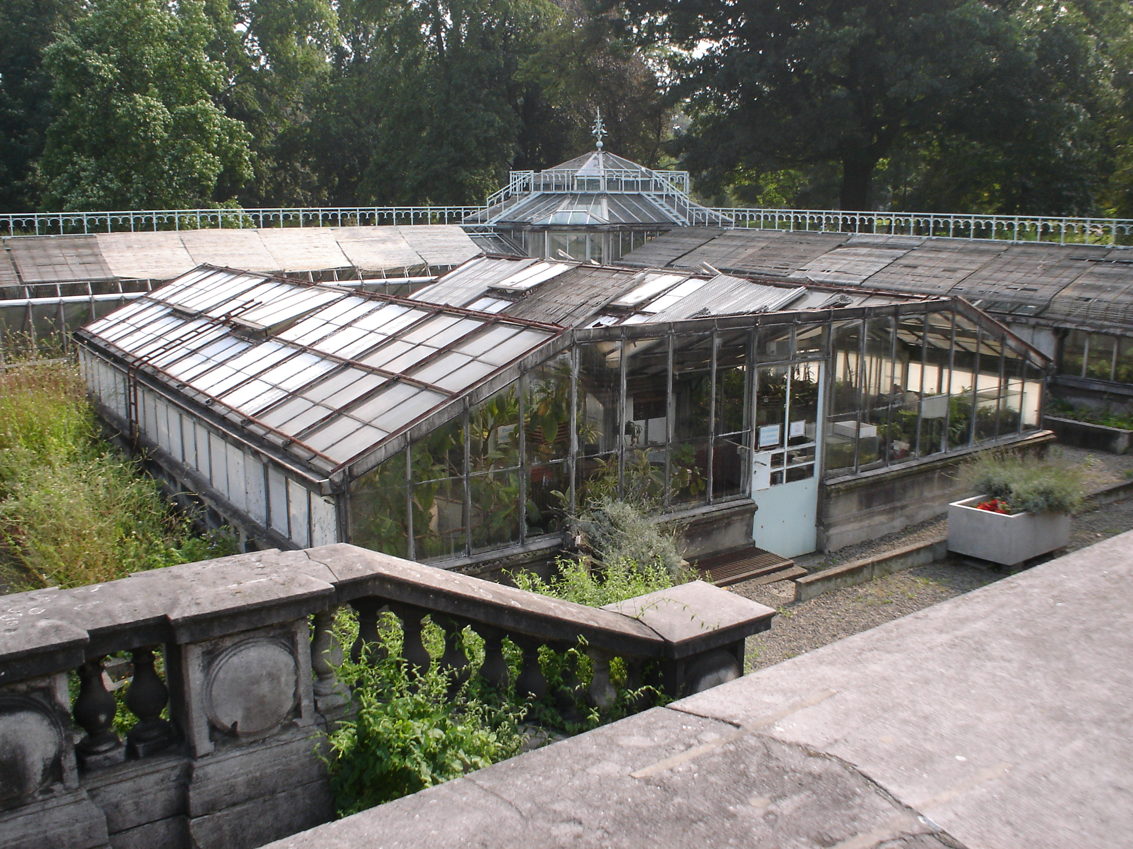 Serres du Jardin Botanique, Liège, Belgique